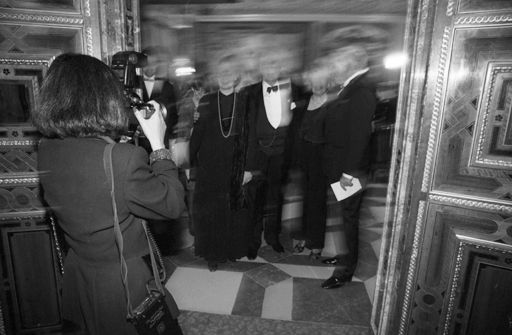 Pressefotografin